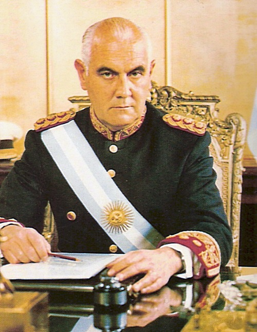 Es una foto del general Lanusse, presidente de facto de Argentina.